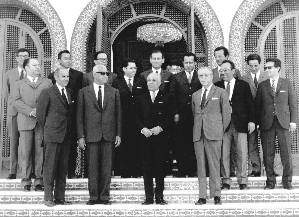 Photo du gouvernement tunisien présidé par Habib Bourguiba. De gauche à droite, première ligne : Bourguiba junior, Bahi Ladgham (Premier ministre), Bourguiba, Hédi Nouira ; deuxième ligne : Hassib Ben Ammar, Mohamed Masmoudi, Ahmed Mestiri ; troisième ligne : Abderrazak Rassaa, Tijani Chelli, Habib Boularès, Mansour Moalla, Driss Guiga, Sadok Ben Jemaa, Mondher Ben Ammar, Abdallah Farhat. Cette photo est prise probablement à la suite du remaniement du gouvernement de Bahi Ladgham en date du 12 juin 1970.